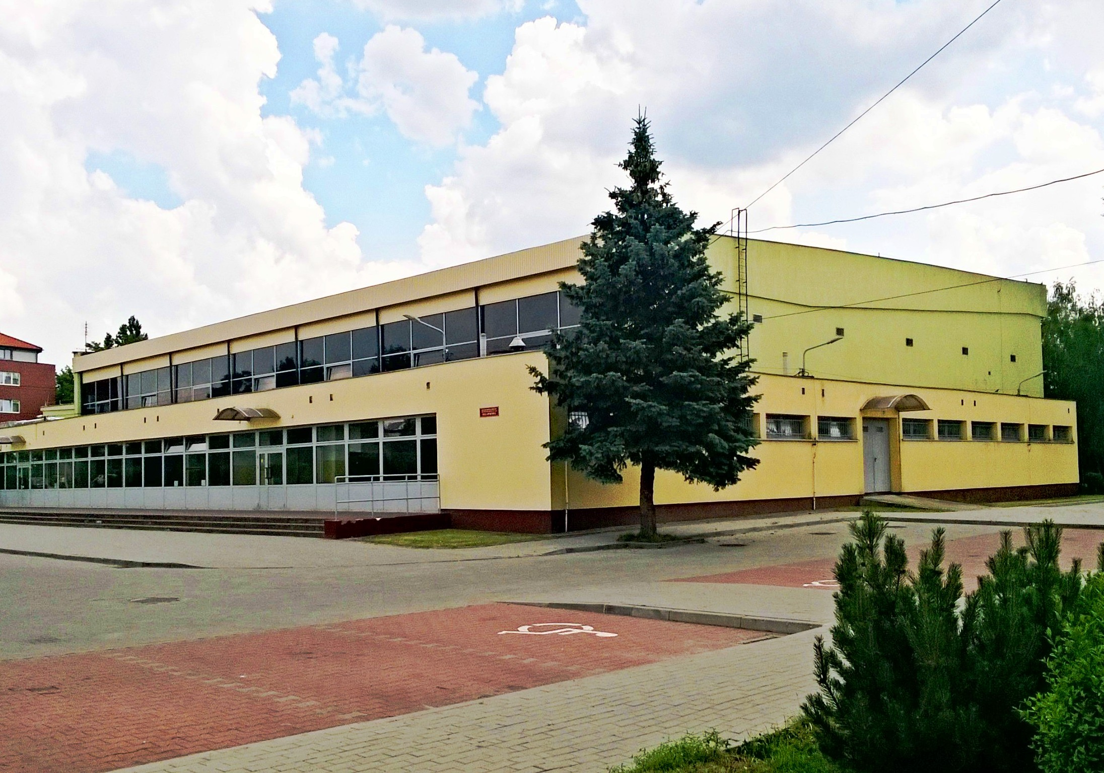 Hala spożywczaka w Toruniu